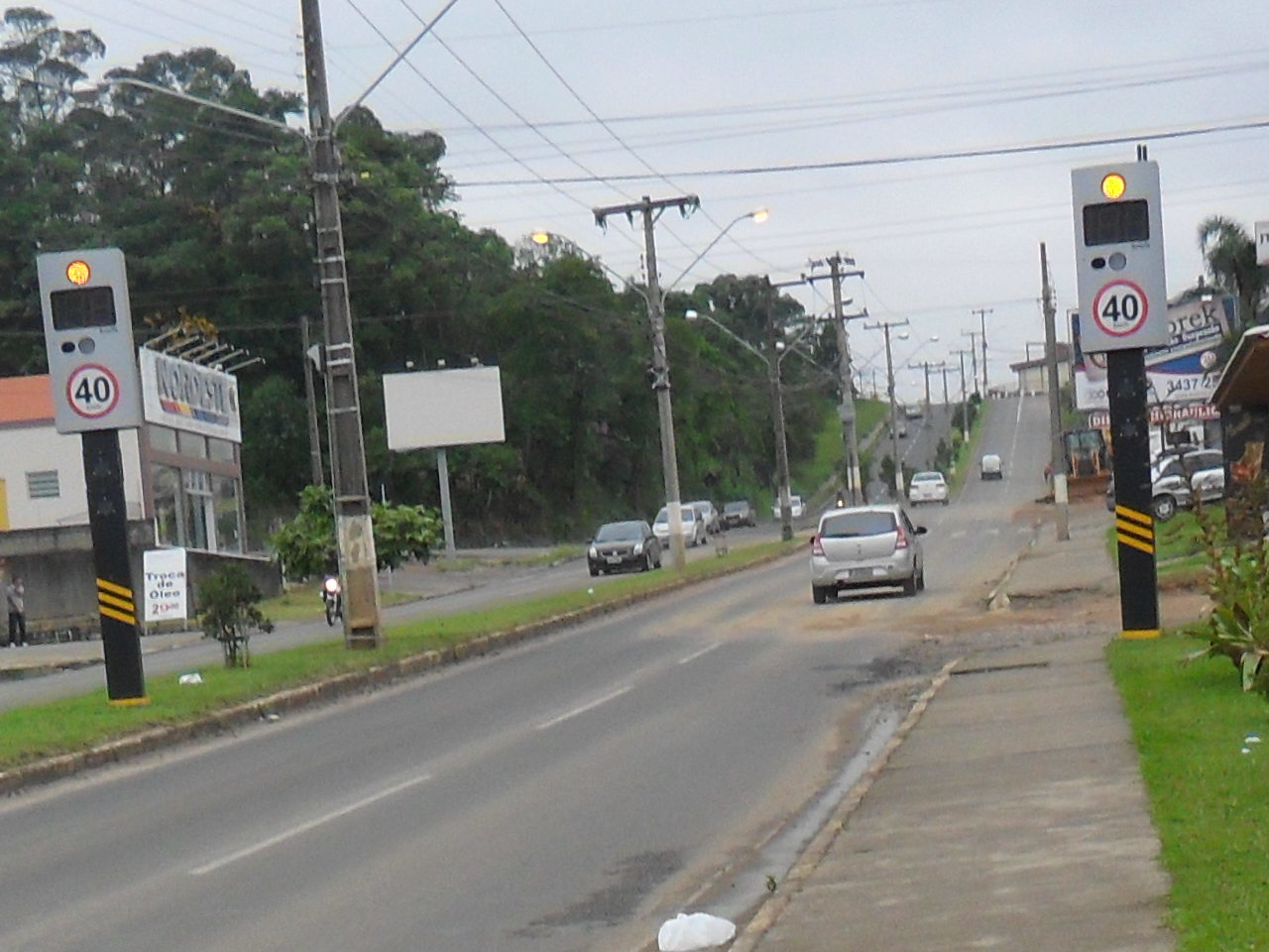 Lombada eletrônica instalada na Avenida Gabriel Zanette.